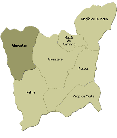 localisation de almoster sur la freguesia de alvaiazere